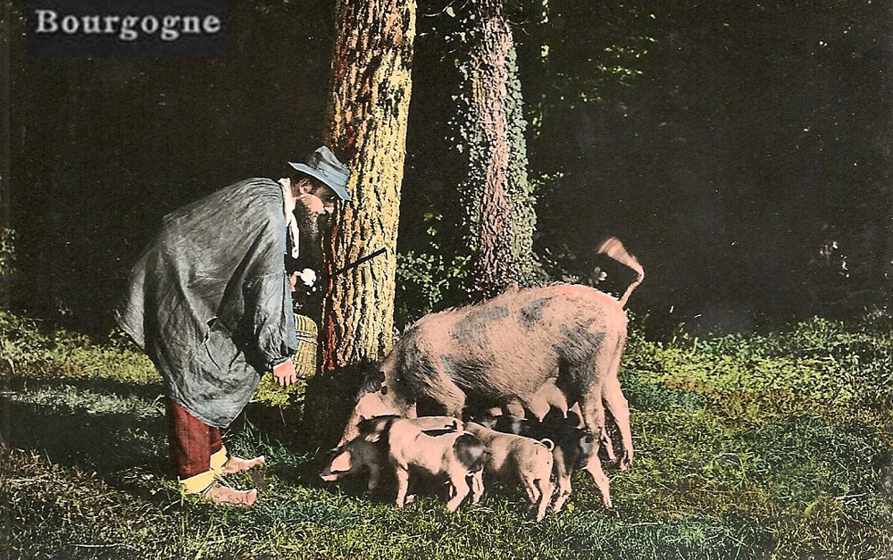 Caveur de truffes et ses cochons en Bourgogne